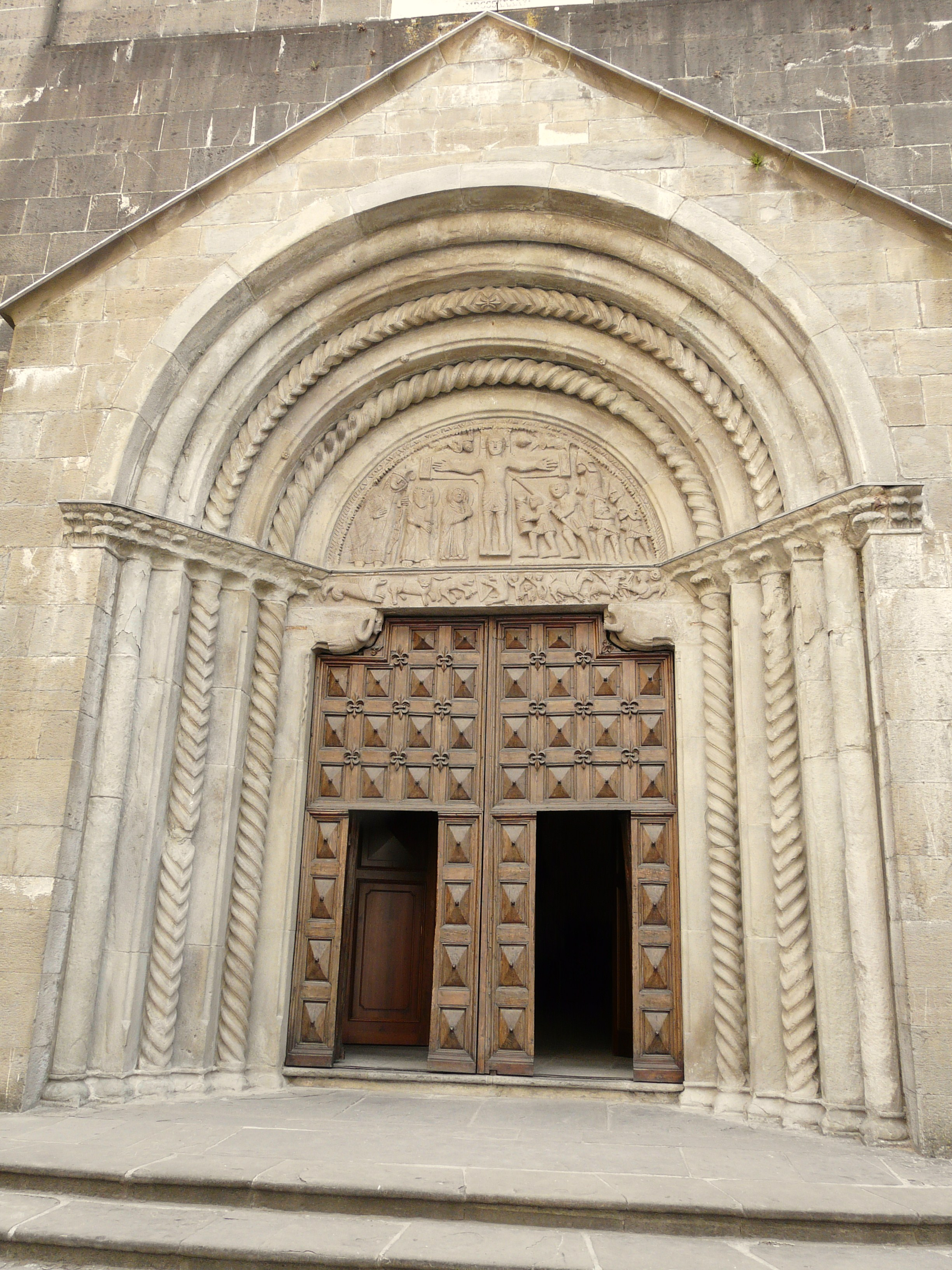 Duomo di Berceto, Emilia Romagna, Italia